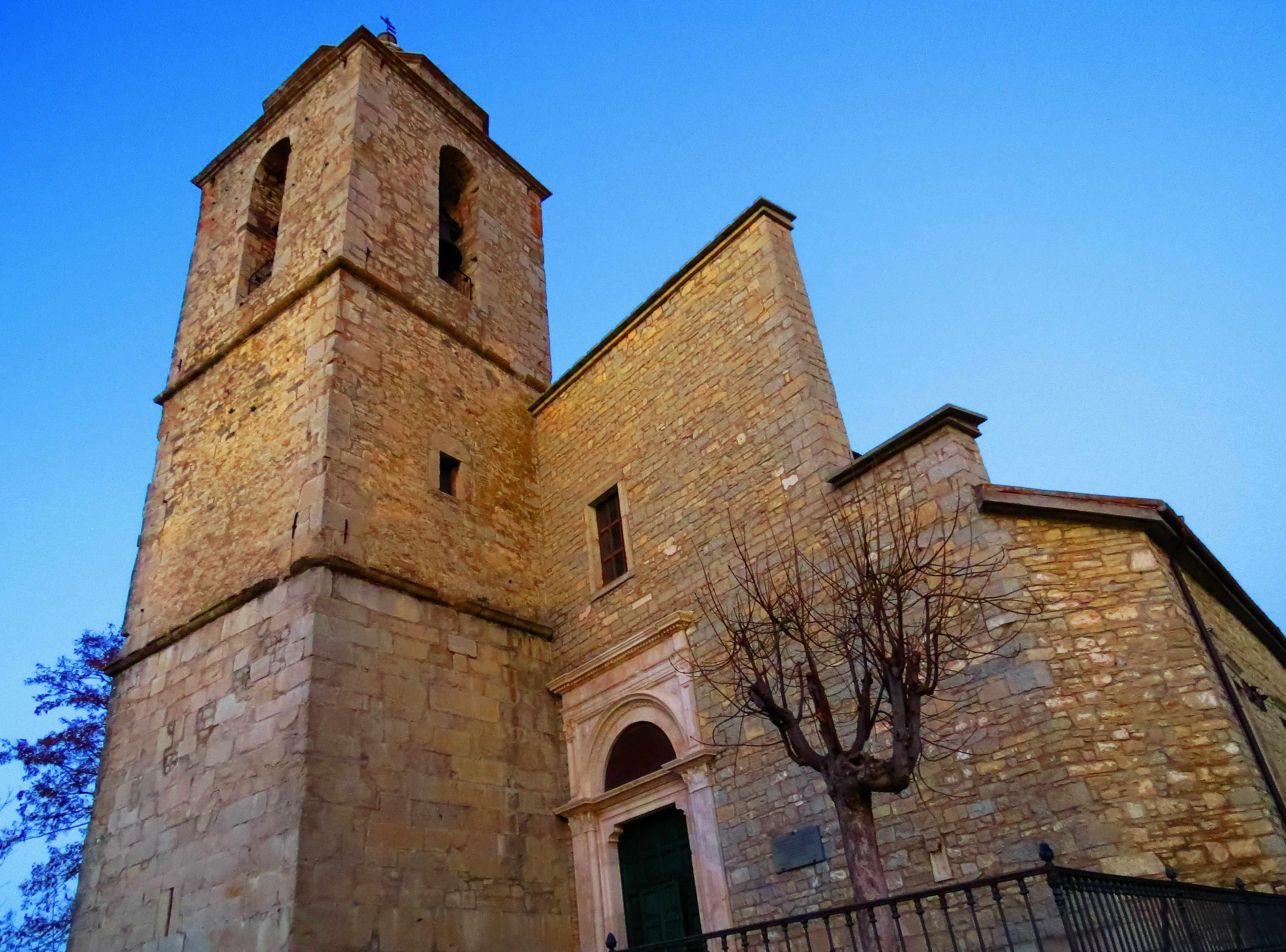 Agnone